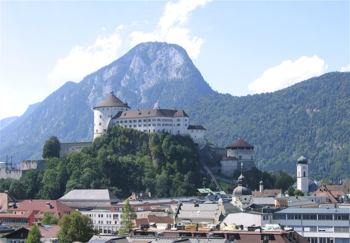 Festung Kufstein, im Hintergrund der Pendling